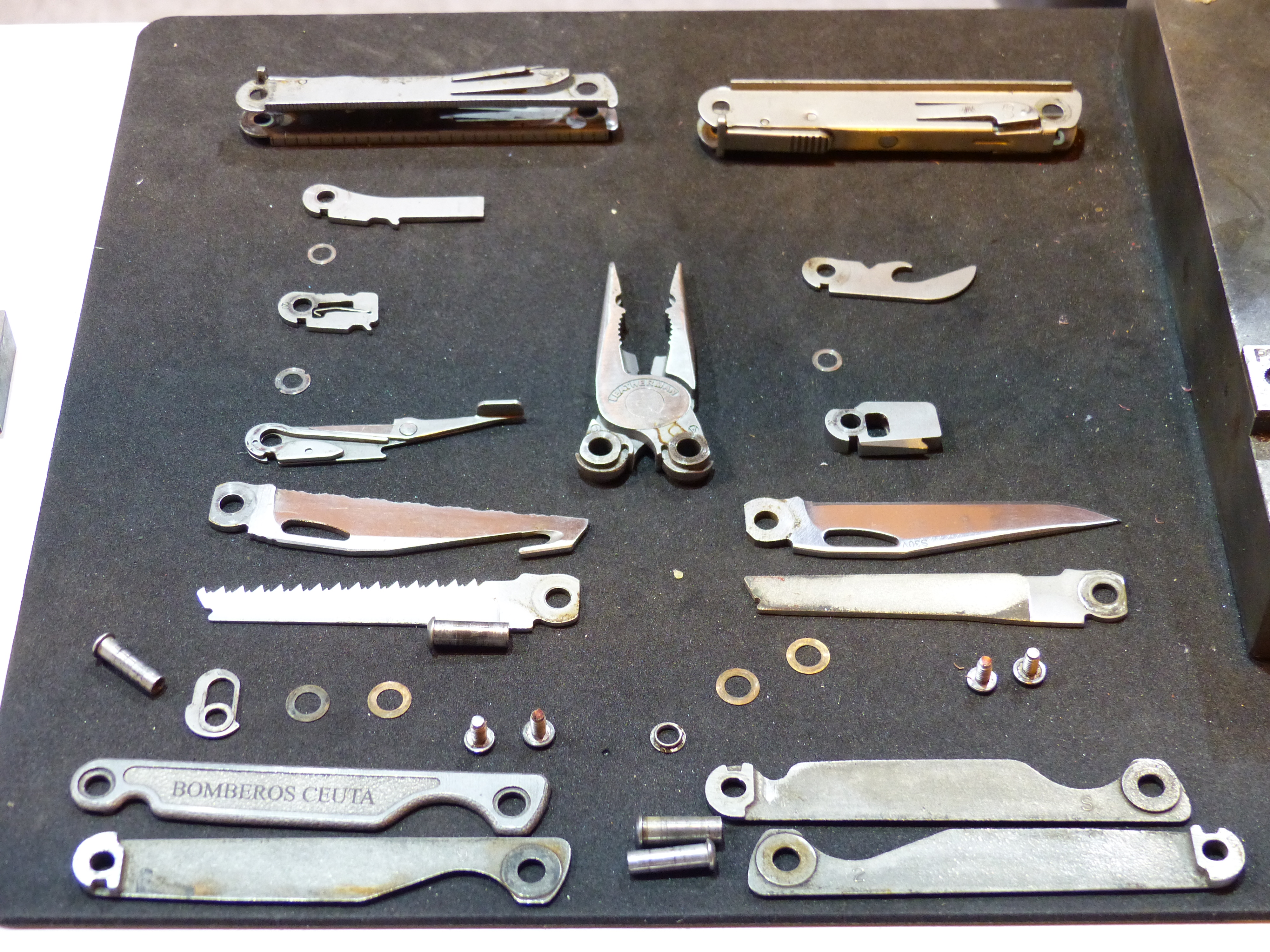 Leatherman, piezas